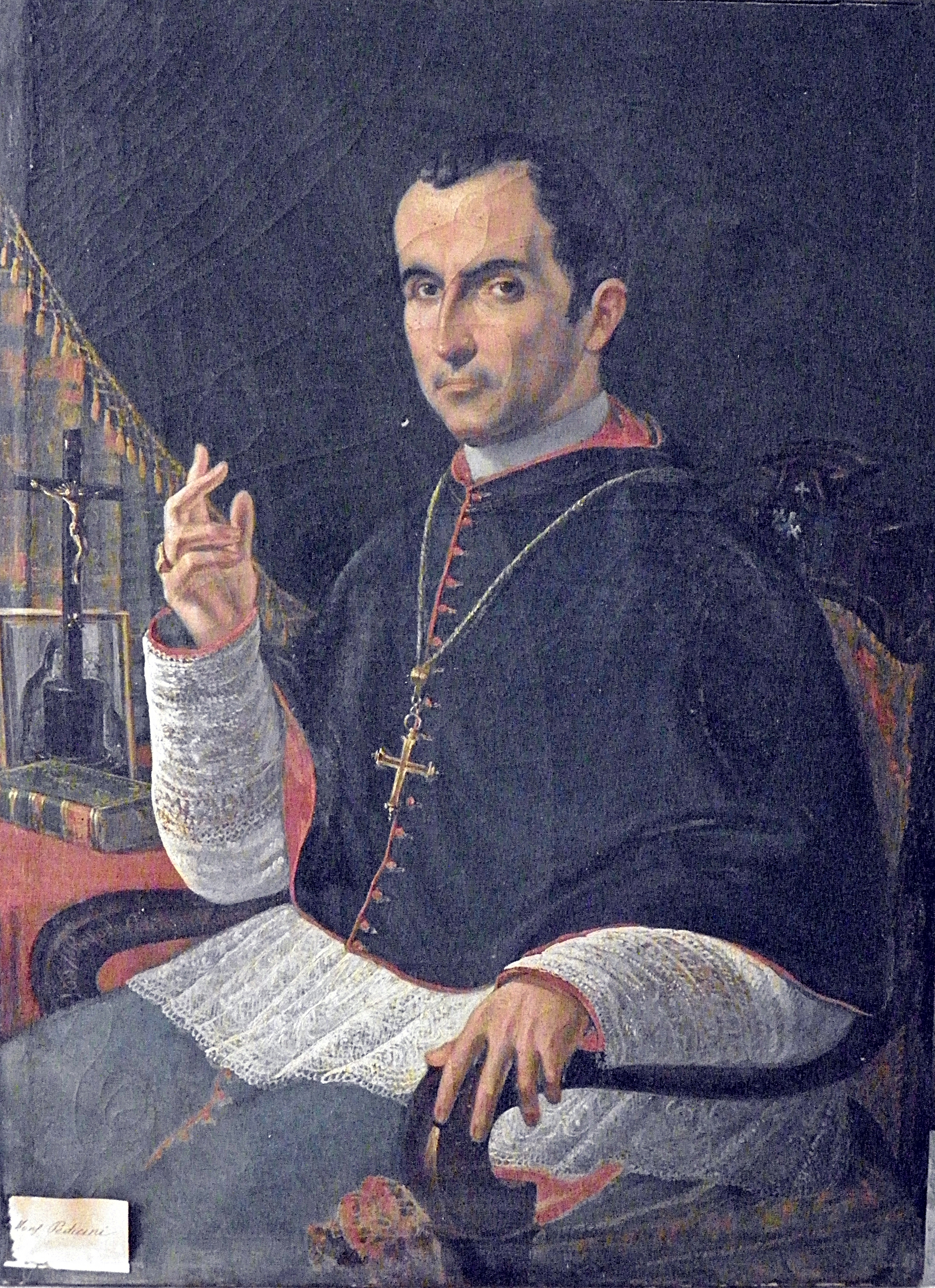 Ritratto del vescovo Pedicini (XIX secolo) conservato nella Curia di Monopoli. La tela è stata dipinta in occasione dell'elezione di Mons. Pedicini a Vescovo di Monopoli. In basso a sinistra è raffigurato un cartiglio cartaceo col nome Pedicini.